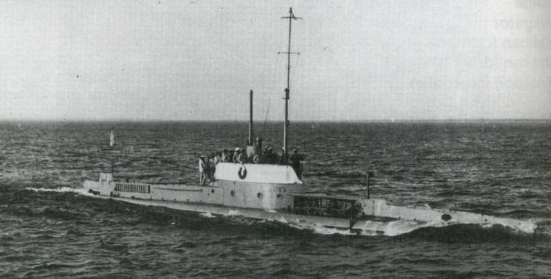 Sous-marin russe Alligator de classe Alligator. Photo prise avant 1917. Image scannée à partir du livre "Submarines of the Tsarist Navy : A pictorial History". Pour plus d'informations sur la licence de l'image, voir Discussion Utilisateur:Alonso/Images Sous-marins. Source I.D. Spassky, V.P. Semyonov & Norman Polmar, Submarines of the Tsarist Navy : A pictorial History, Naval institute Press, États-Unis, 1998 (ISBN 1-55750-771-6)